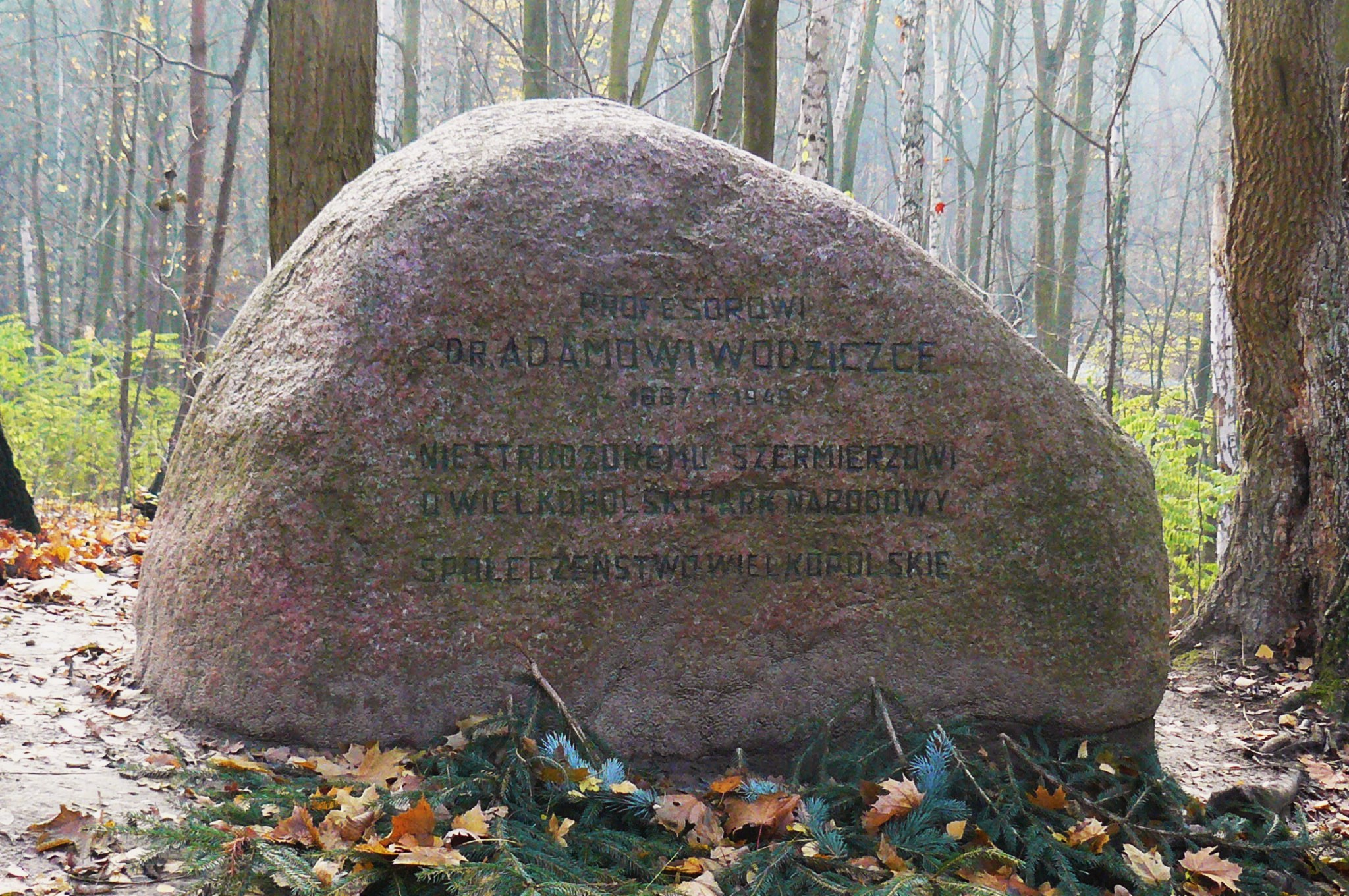 Głaz Wodziczki w Osowej Górze.